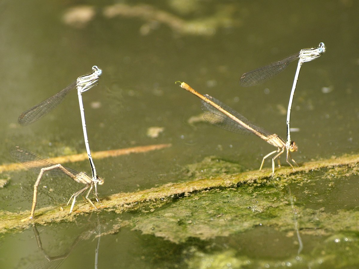 Platycnemis latipes posta